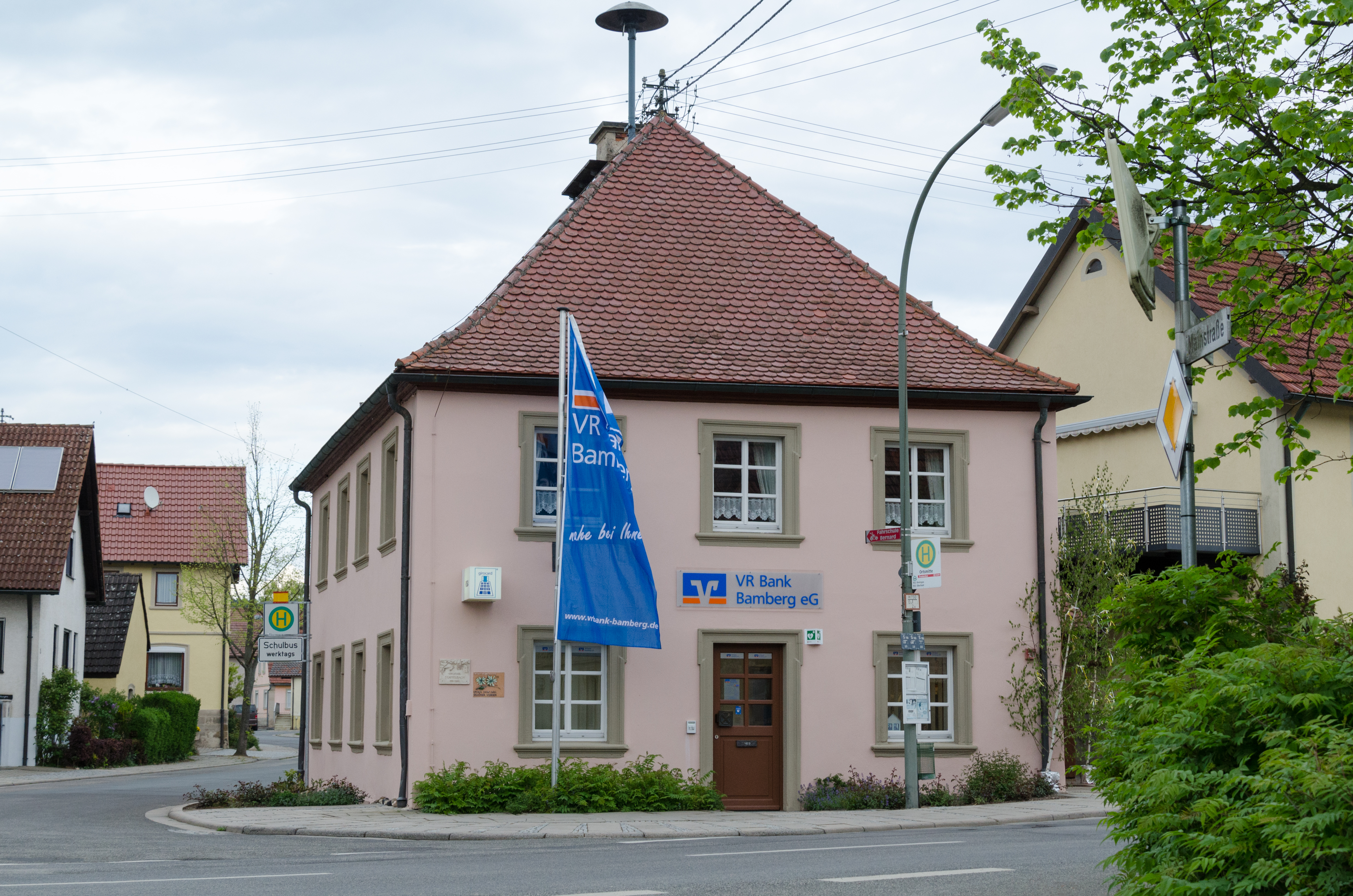 Oberhaid, Staffelbach, Hallstadter Straße 1